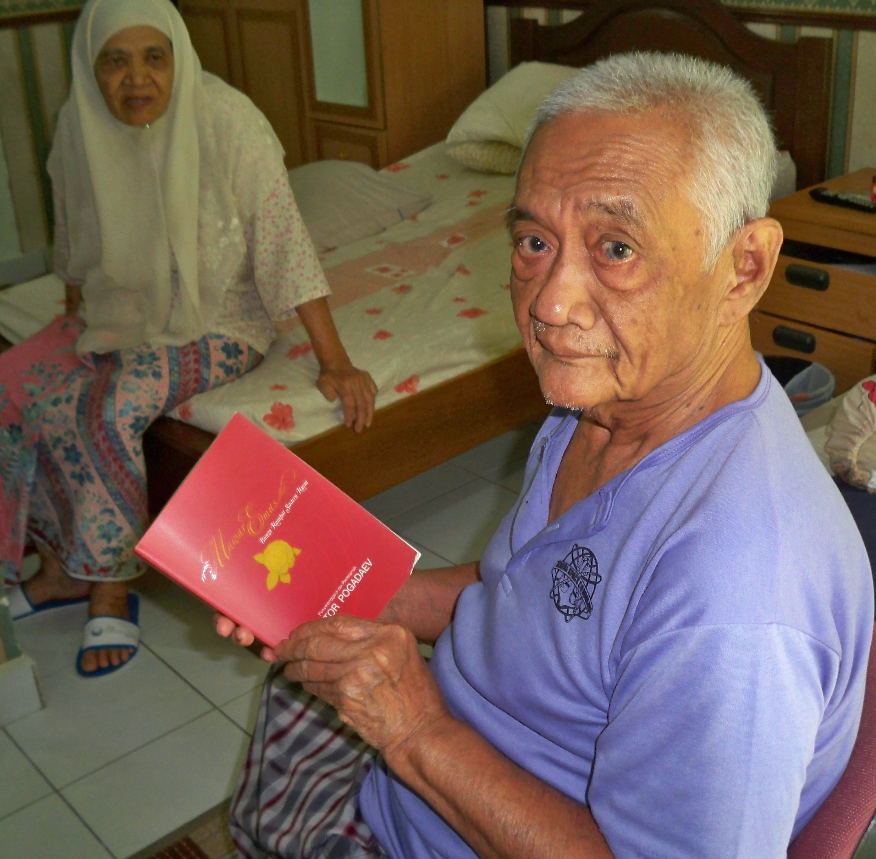 малайзийский писатель Шахнон Ахмад